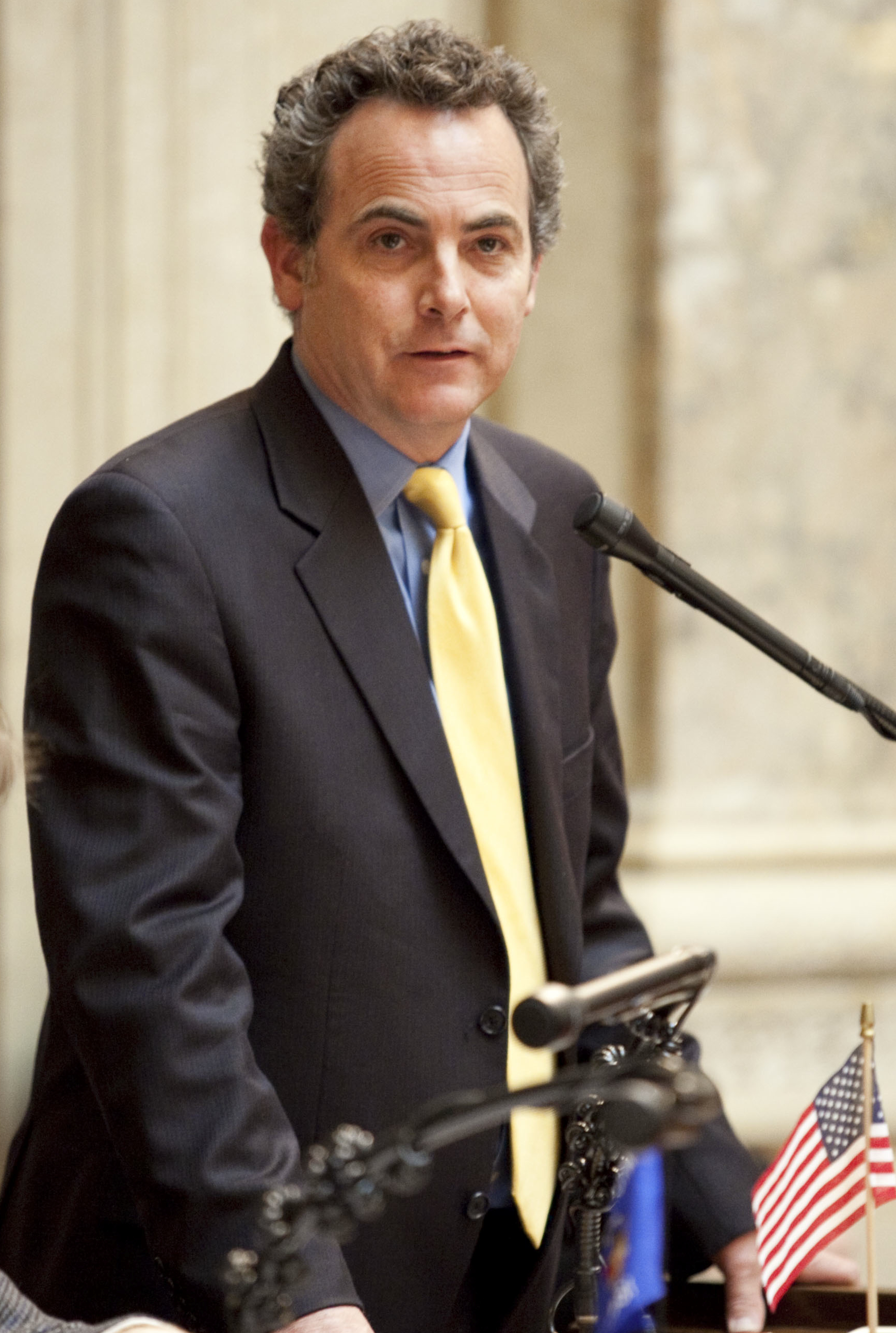 Wisconsin State Senator Jon Erpenbach.